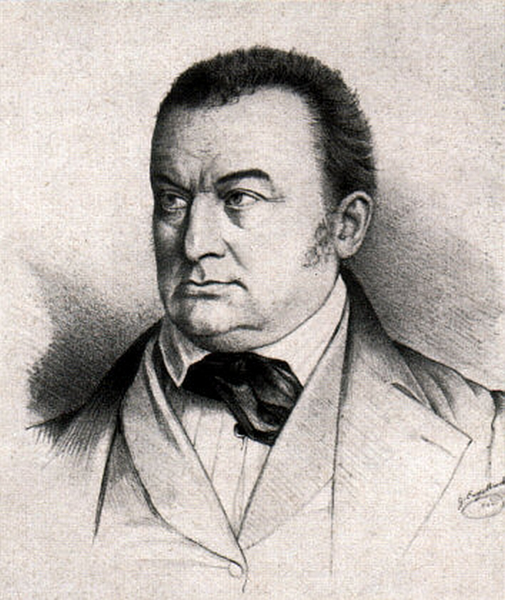 Christoph Friedrich Karl von Kölle (1781 - 1848), württembergischer Diplomat, Literat und Gemäldesammler